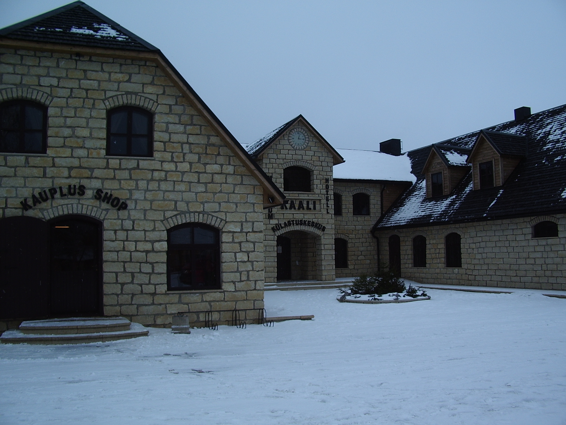 Külastuskeskus Kaali külas Saaremaal